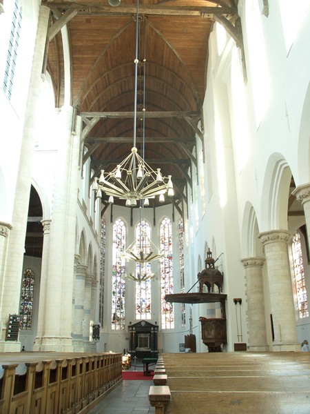 Delft - Església vella - Interior